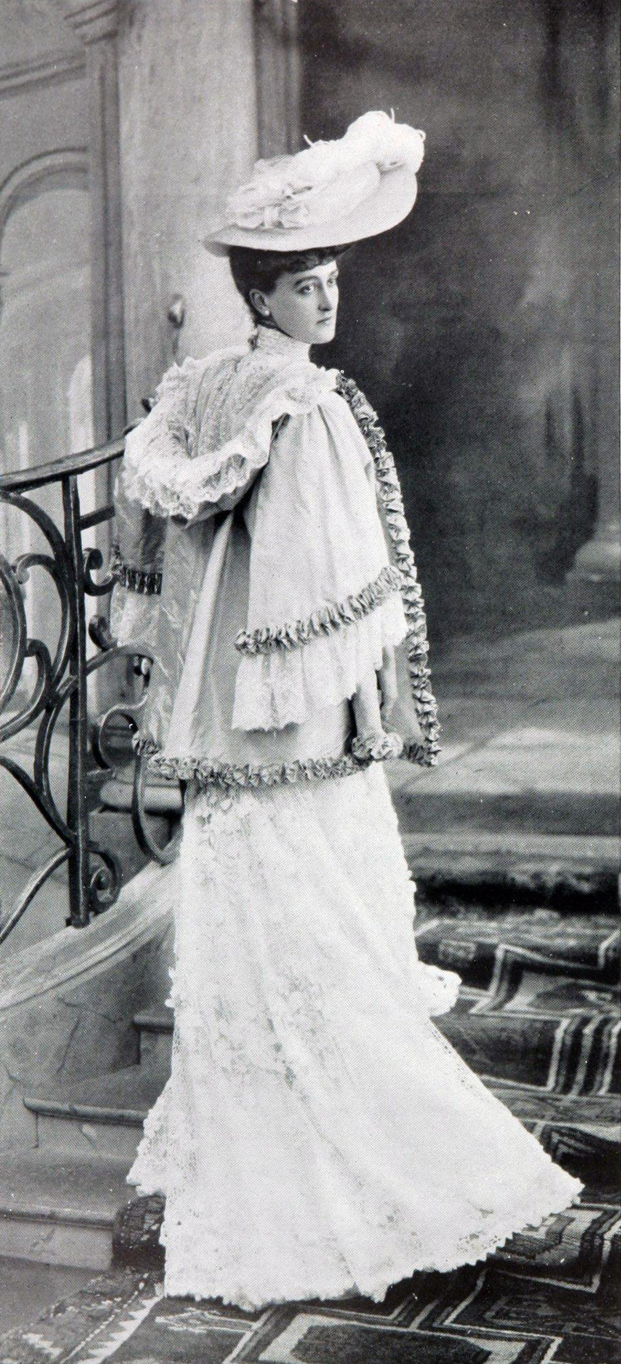 "Robe en guipure d'Irlande. Mantelet [à capuchon] en messalinette mordorée changeante, garnie de dentelles valenciennes." Photograph in Les Modes : Revue mensuelle illustrée des arts décoratifs appliqués à la femme.